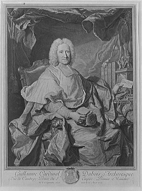 Portrait de Guillaume Dubois (1656-1723), cardinal français et homme politique